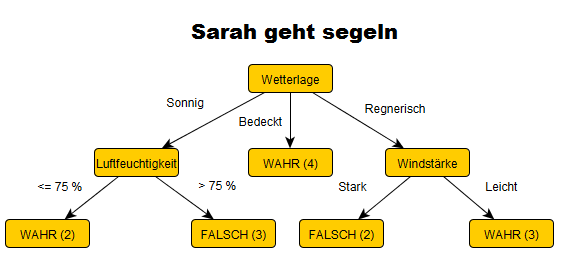 Von C4.5 Entscheidungsbaum für das Beispiel: Sarah geht segeln